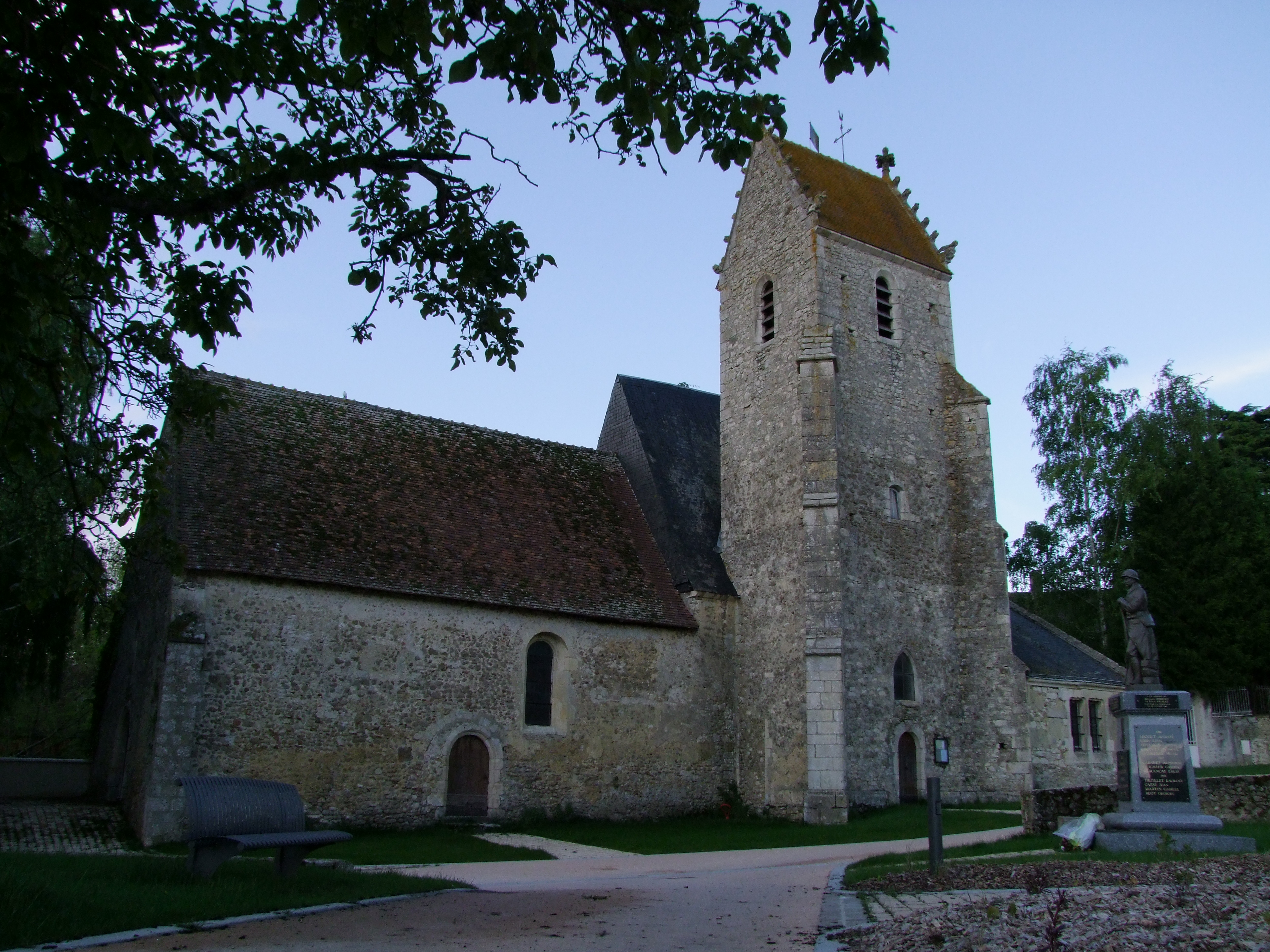 Église Saint-Germain-de-Paris de Sceaux-sur-Huisne .